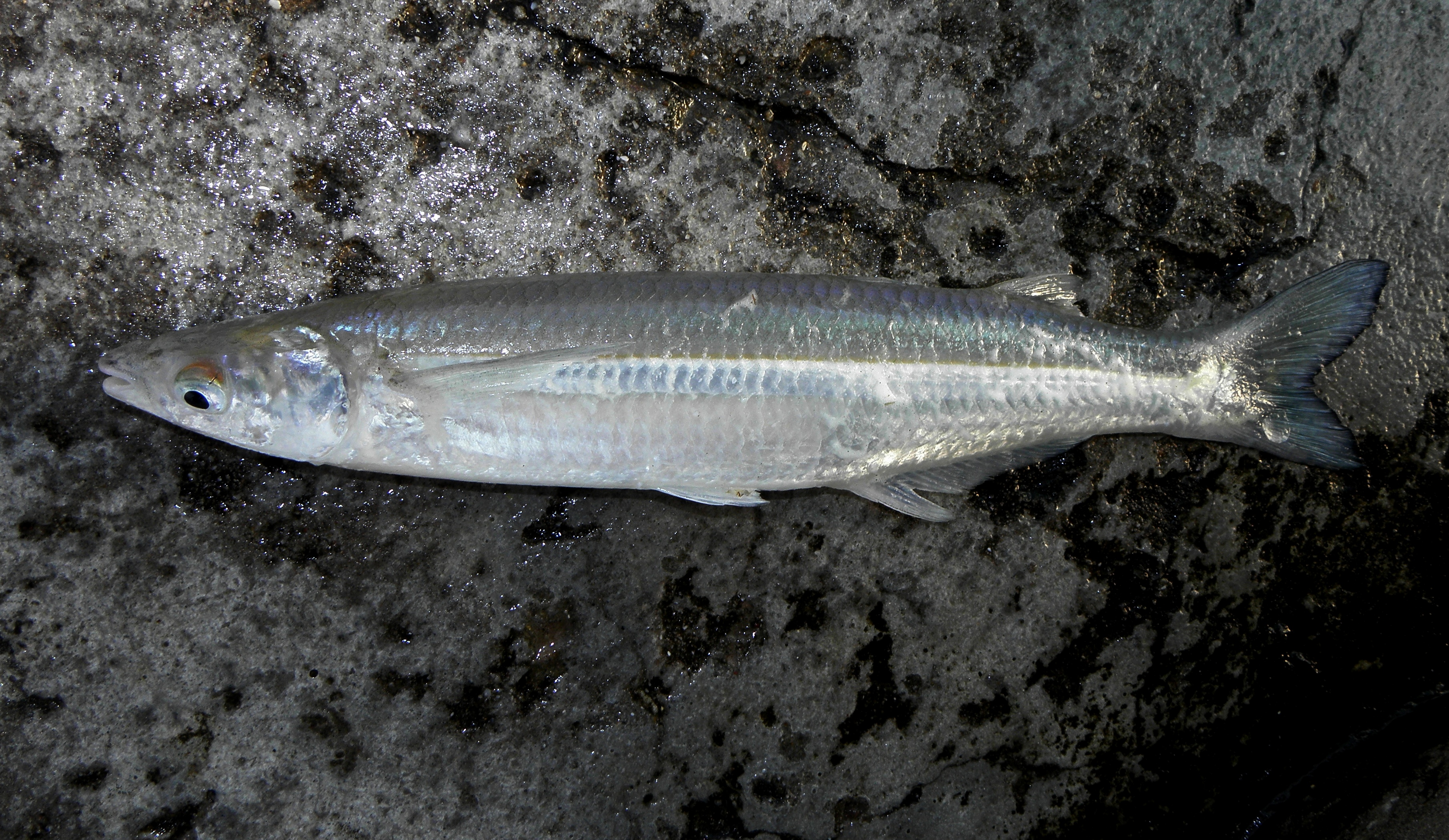 Pejerrey escardón o pejerrey baboso (Odontesthes argentinensis) en Mar del Plata, Argentina.